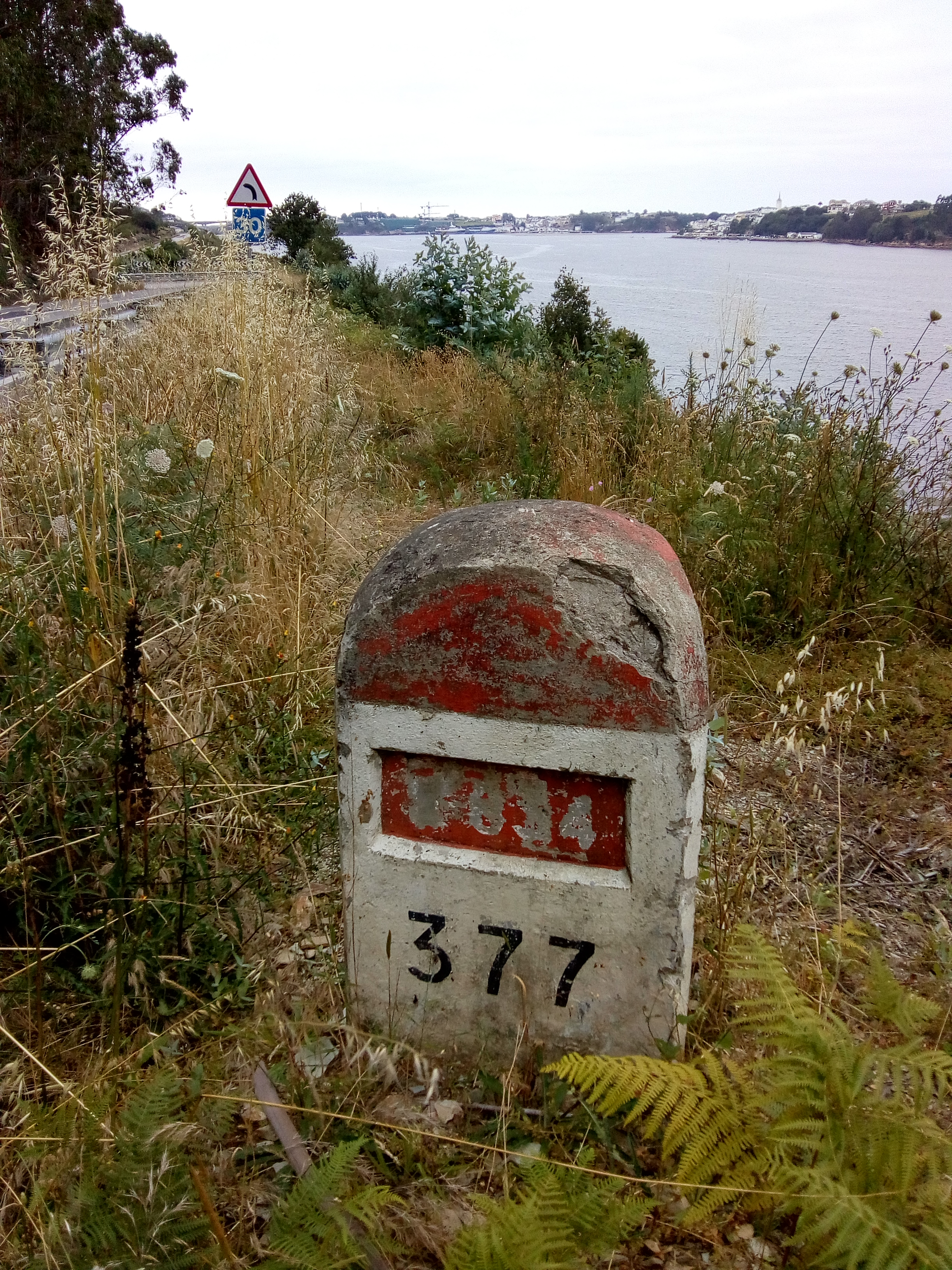 Fito quilométrico N634 km 377, na actualidade, entre a N642 e a ría de Ribadeo.